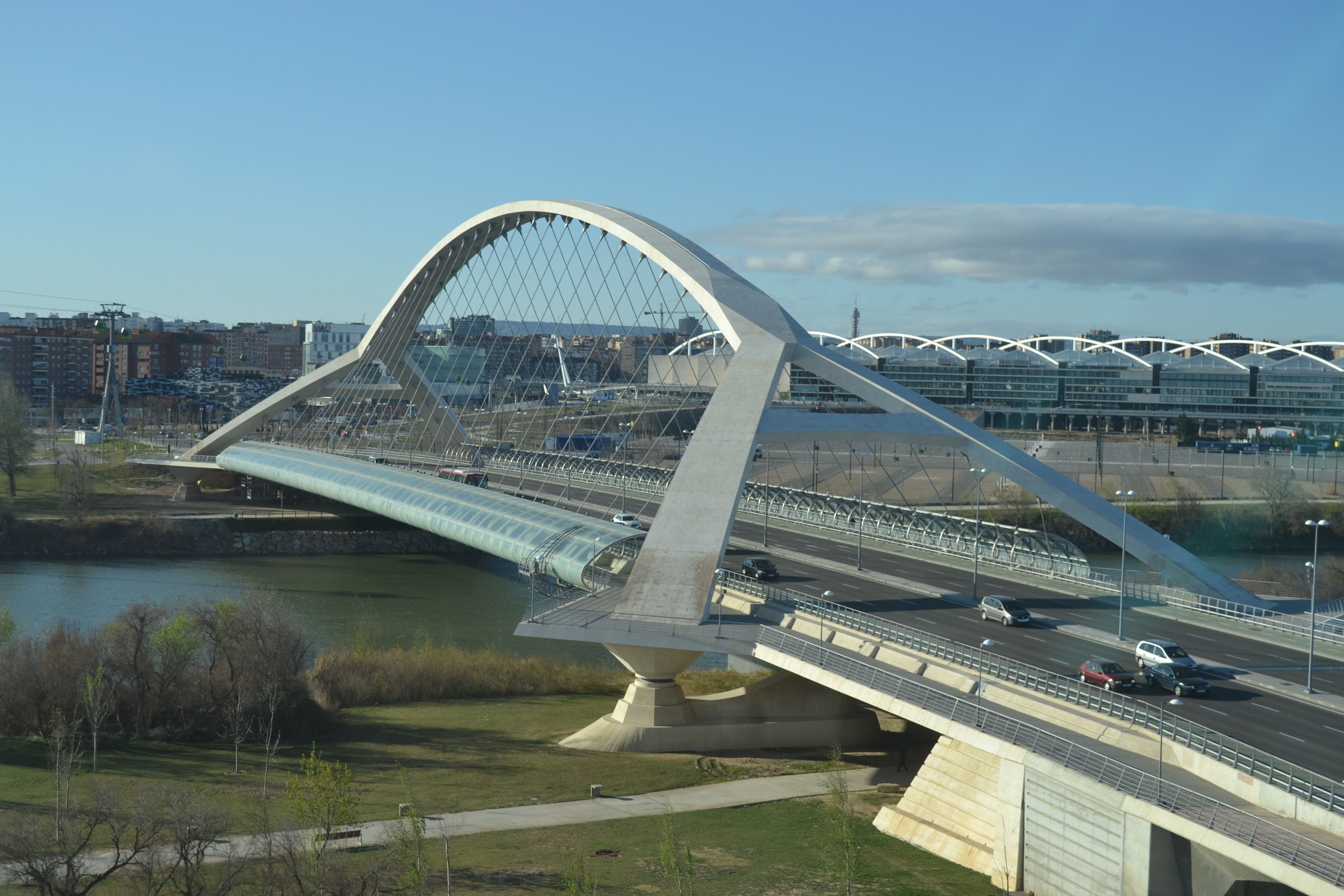 Puente del Tercer Milenio desde el hotel Hiberus, Zaragoza